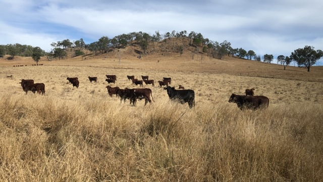 Farm In Australia 2018 June